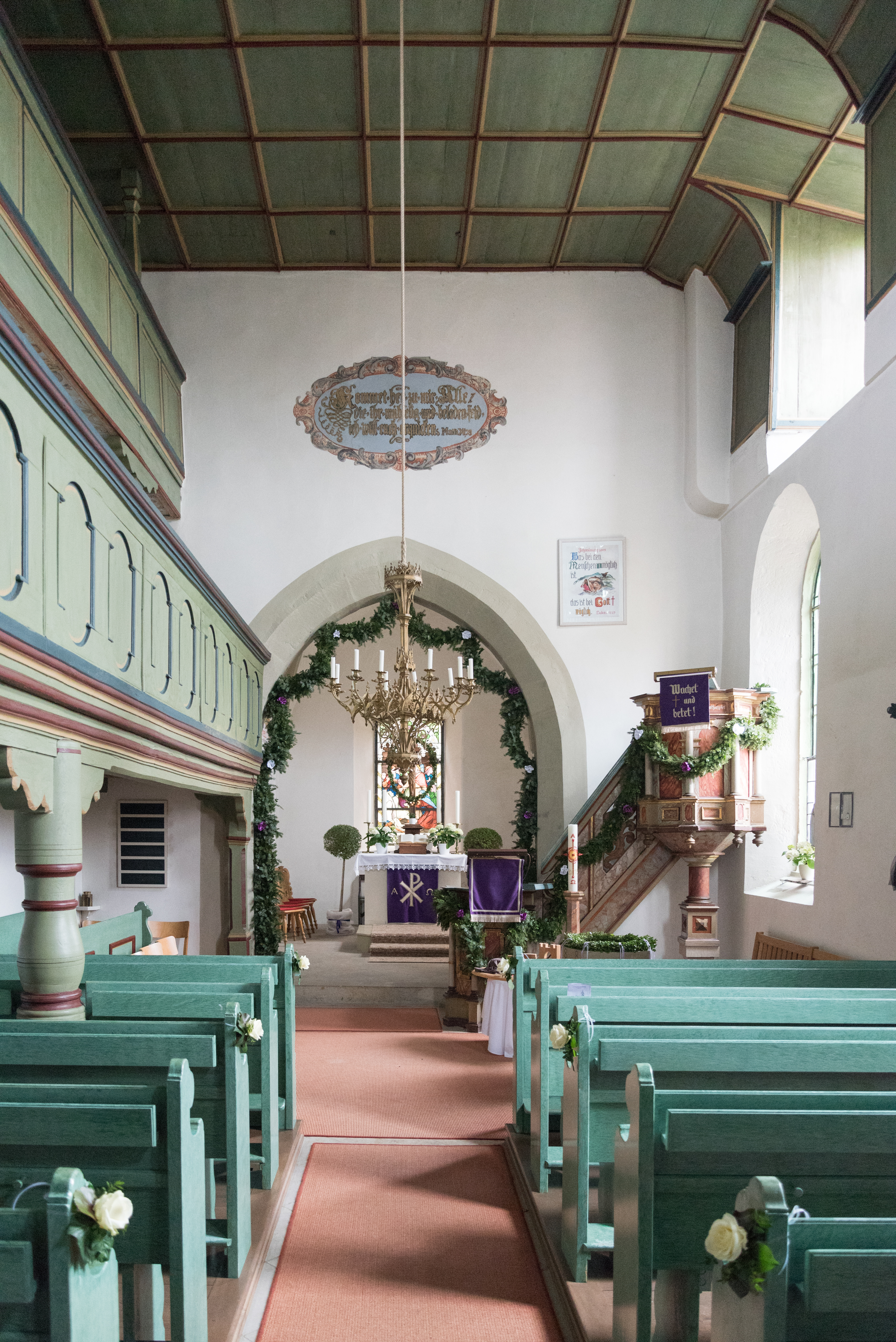 Königsberg in Bayern, Unfinden, St, Bonifatius